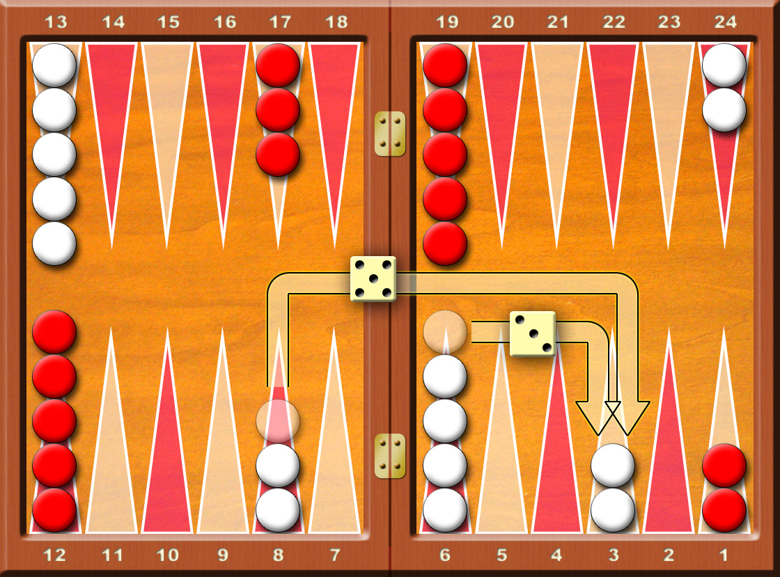 Backgammon--Dadi_5e3-Mossa con due pedine Francesco De Lorenzo (fr.dl CHIOCCIOLA tiscali.it) è l'autore di questa immagine e l'ha rilasciata sotto licenza GFDL